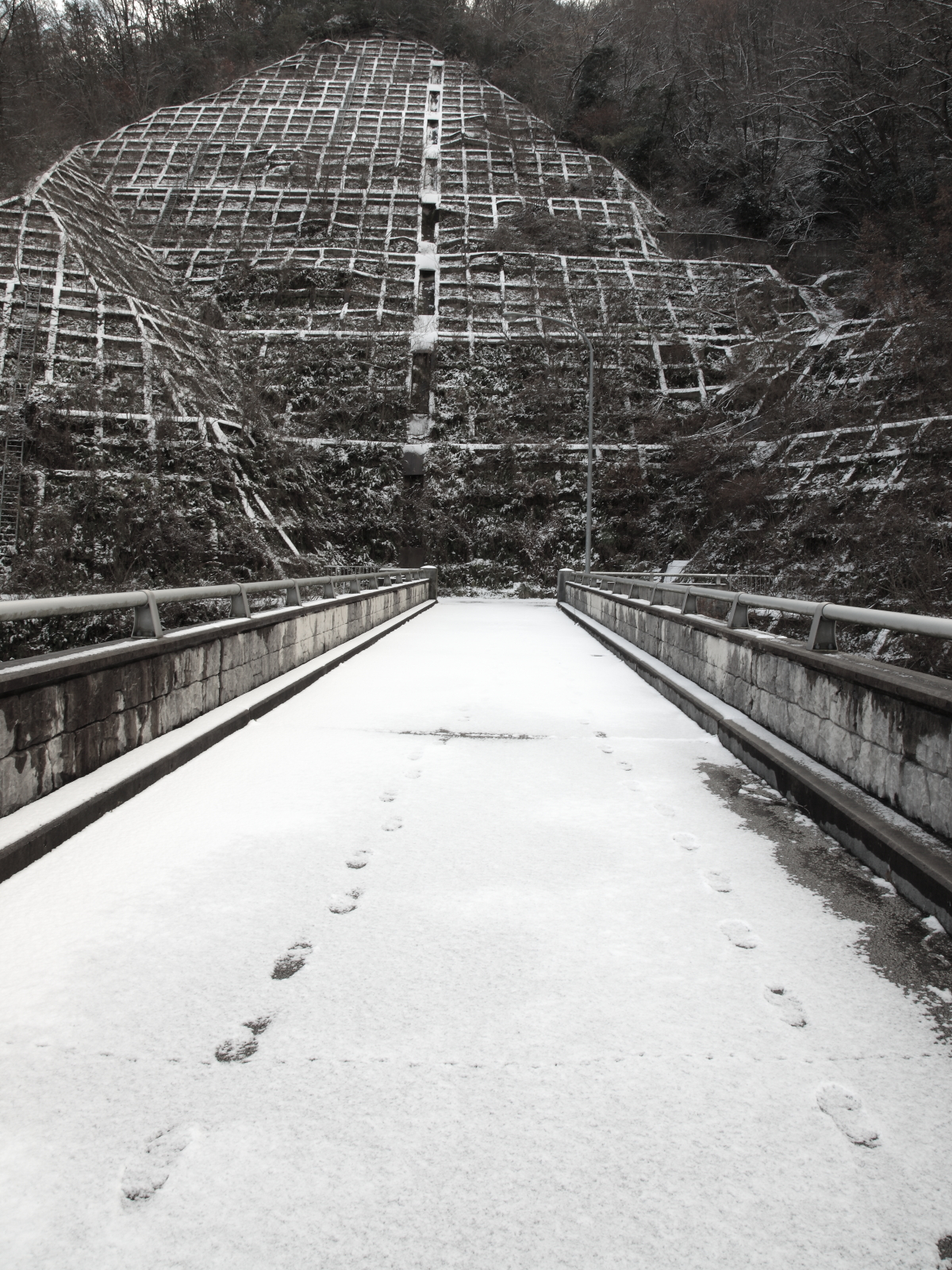 木瀬ダム天端、豊田市木瀬町、2009年